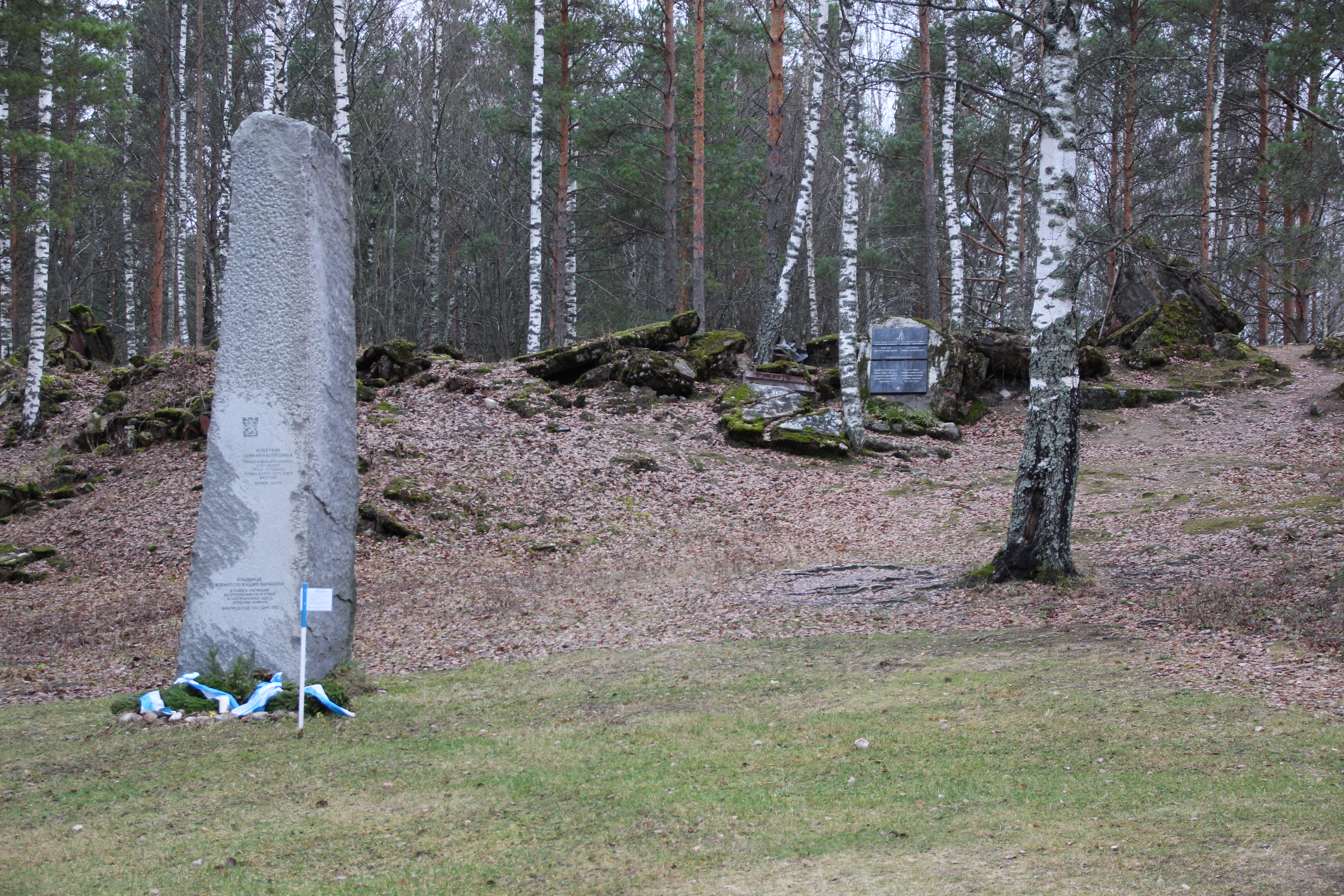 Барышевский оз, Выборгский район This image is related to the protected area of Russia number 4710048